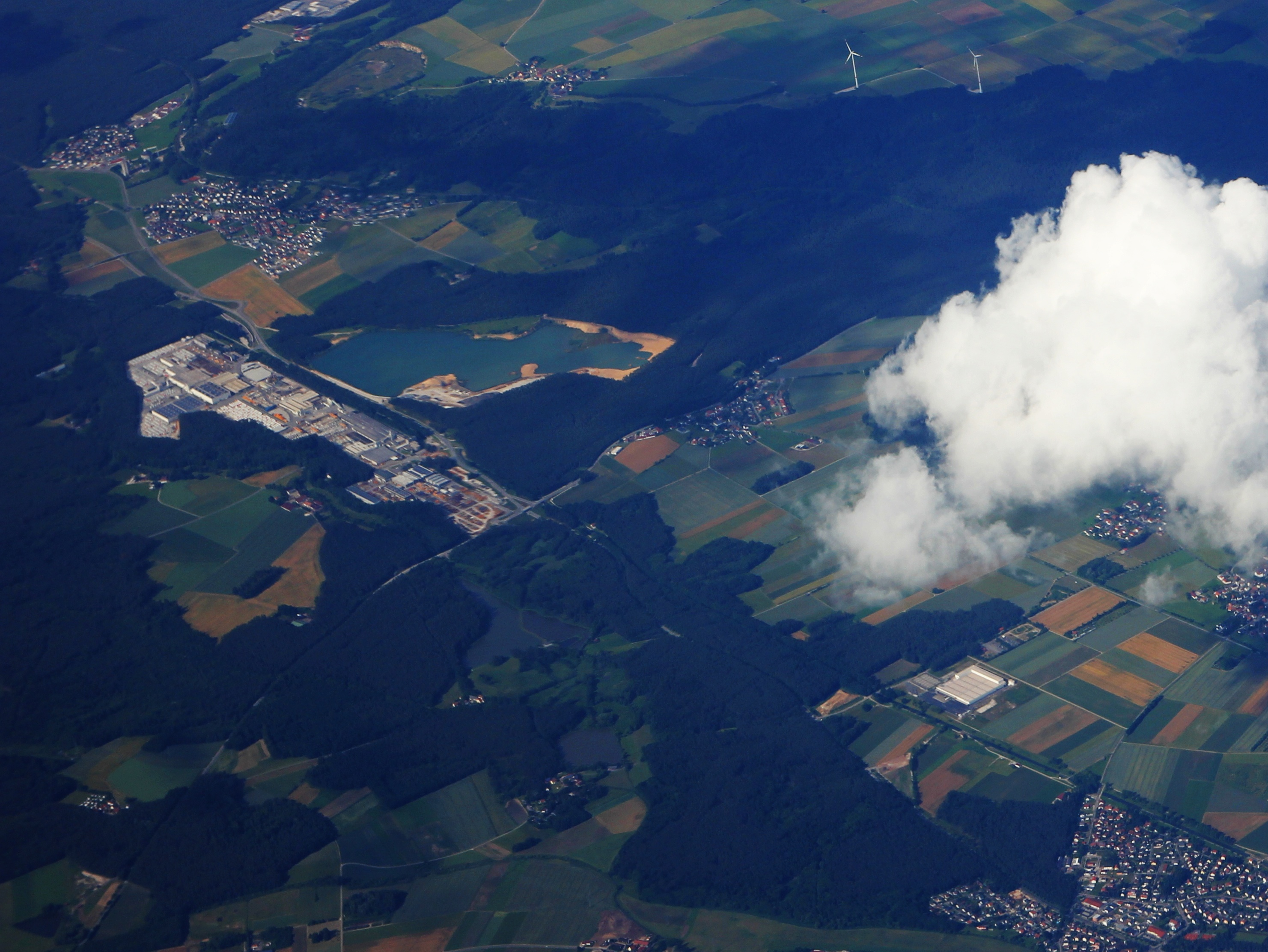 Luftbild Gewerbegebiet Schlierferheide / Sengenthal (Max Bögl AG)